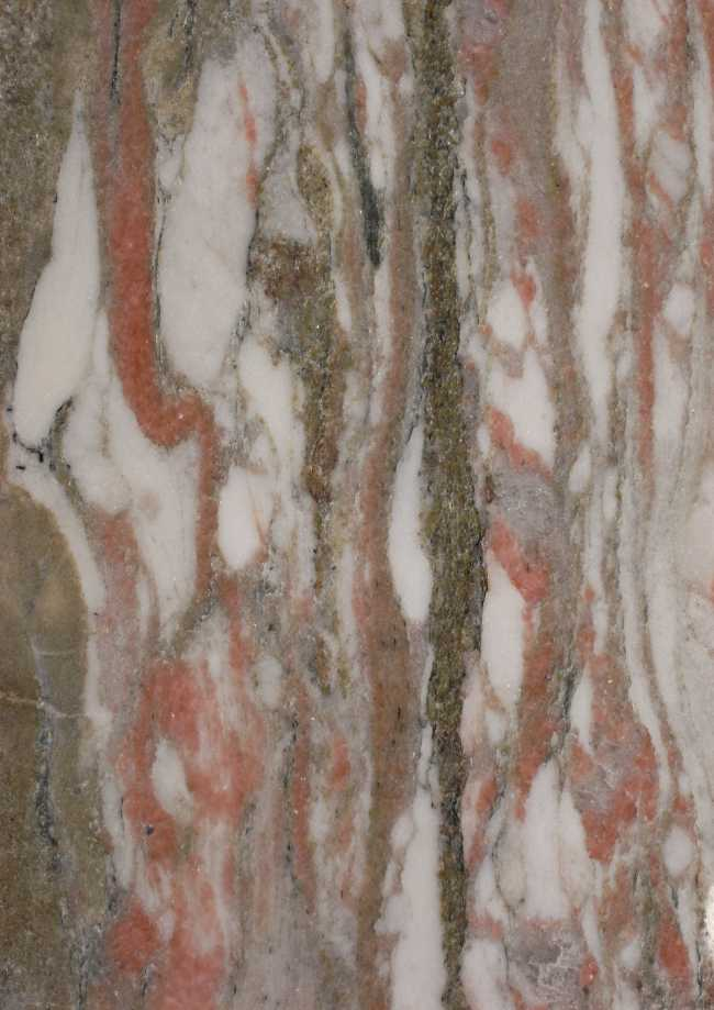 Norvro